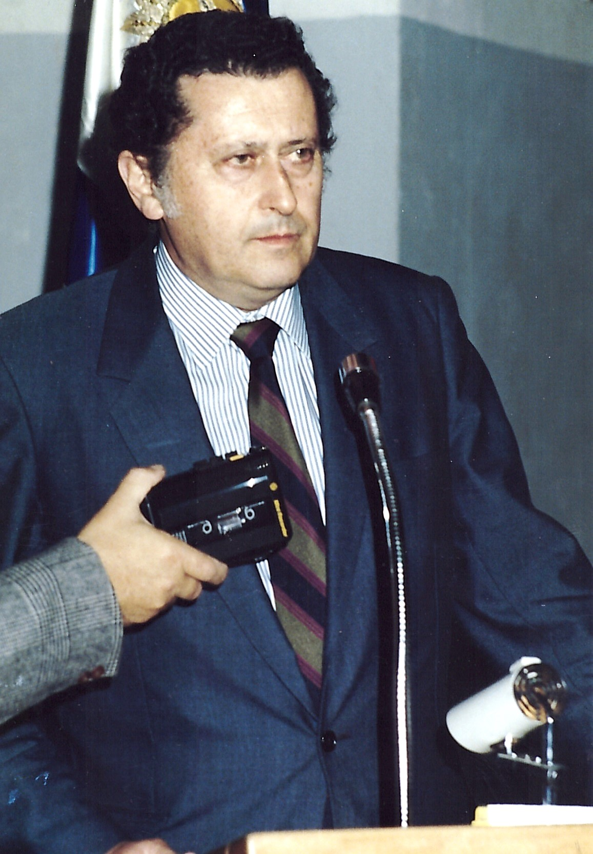 Walter Hugo Pagés en 1995.